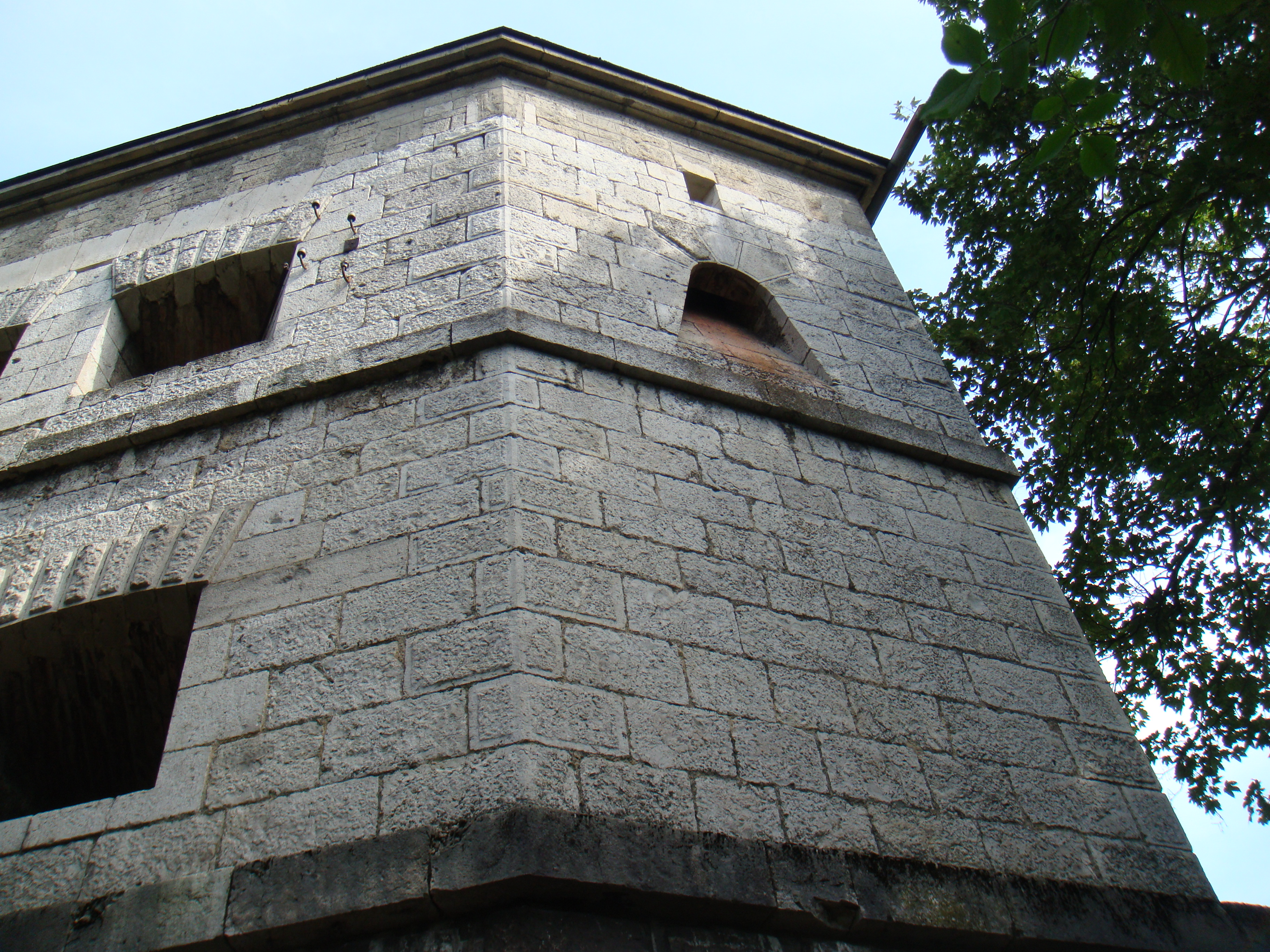 Maschikuli am Örlinger Turm der Bundesfestung Ulm